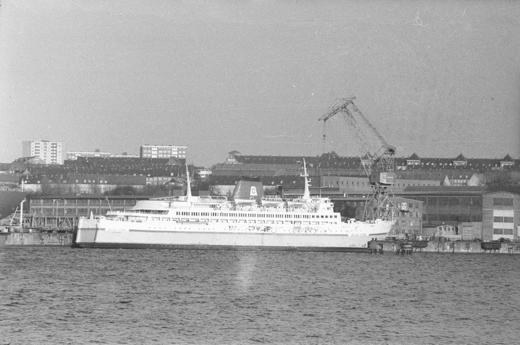 liegt zur Grundüberholung an der Pier bei den Howaldtswerken Deutsche Werft AG (HDW) in Dietrichsdorf.